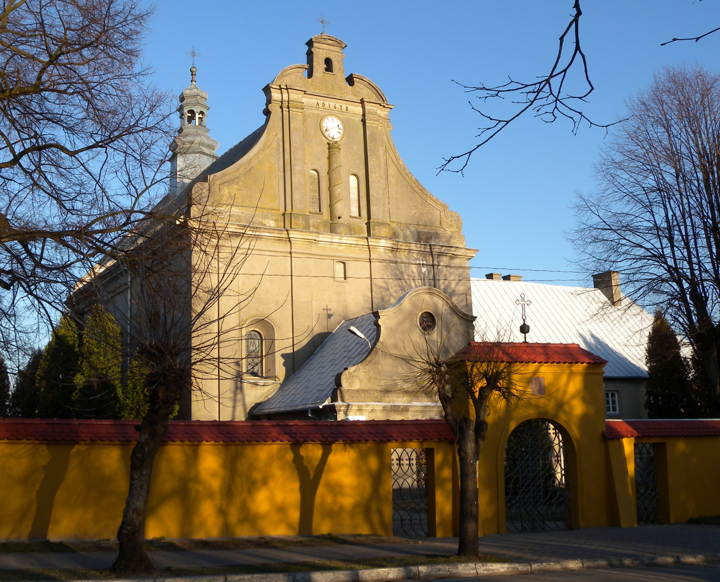 Widawa kościół pw. Podwyższenia Krzyża Świętego